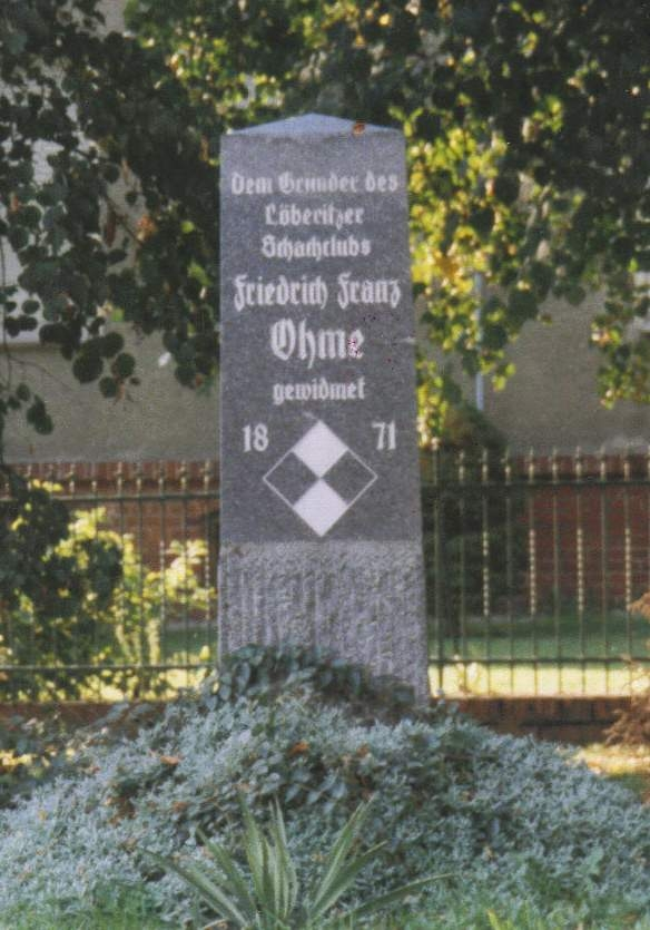 Franz-Ohme-Denkmal in Löberitz / Stadt Zörbig